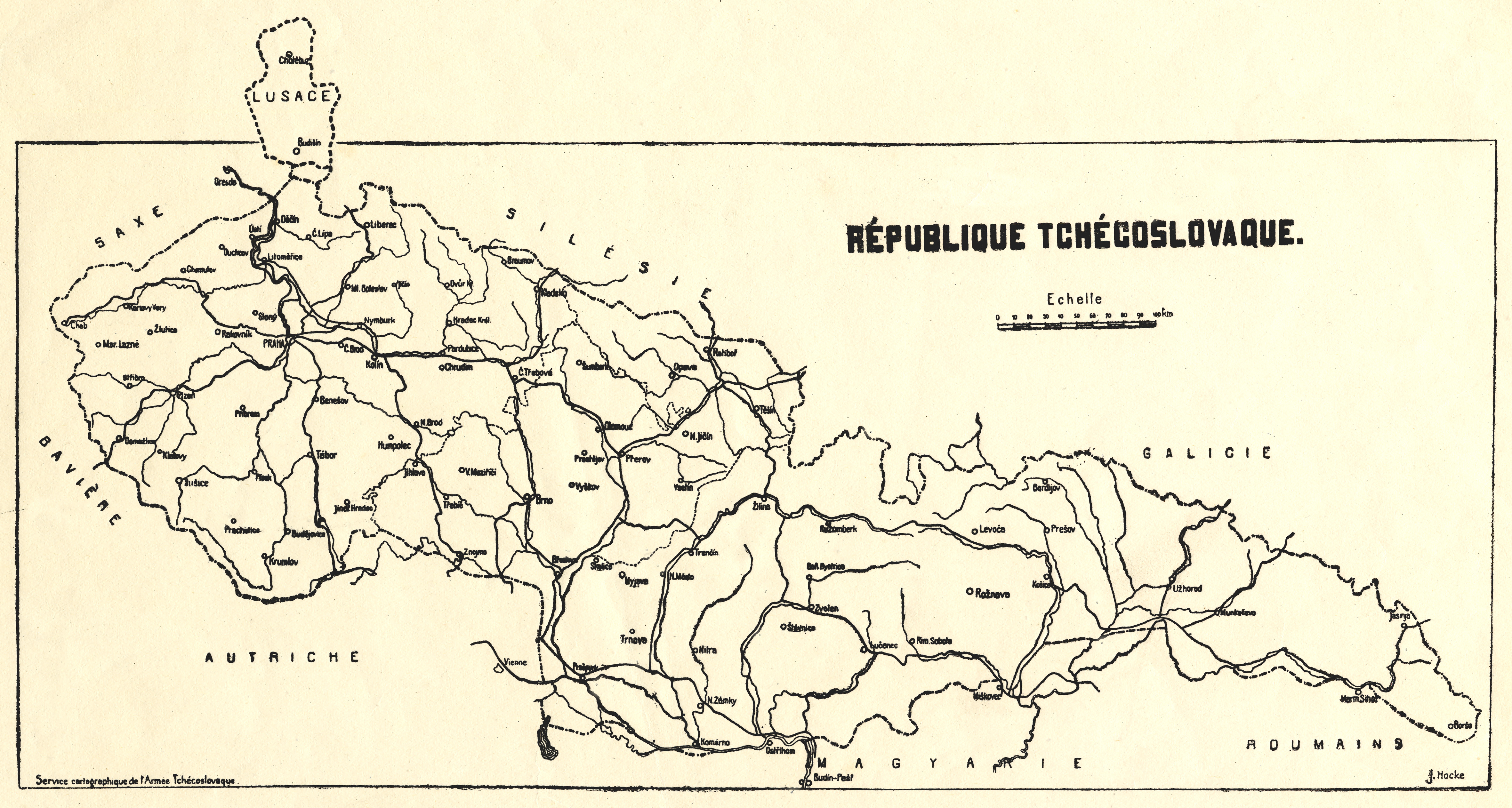 Návrh úprav hranic Československa, nakreslil Jan Hocke v letech 1918-1919.